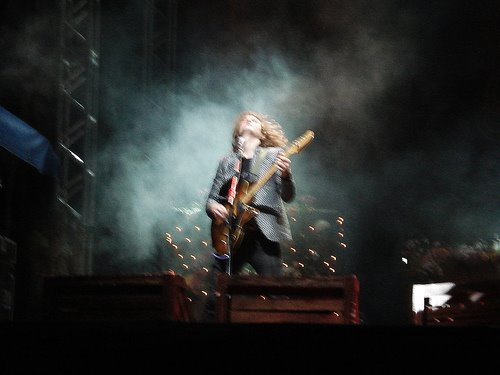 Dave Keuning (guitarra do Killers) no TIM Festival 2007 em Curitiba